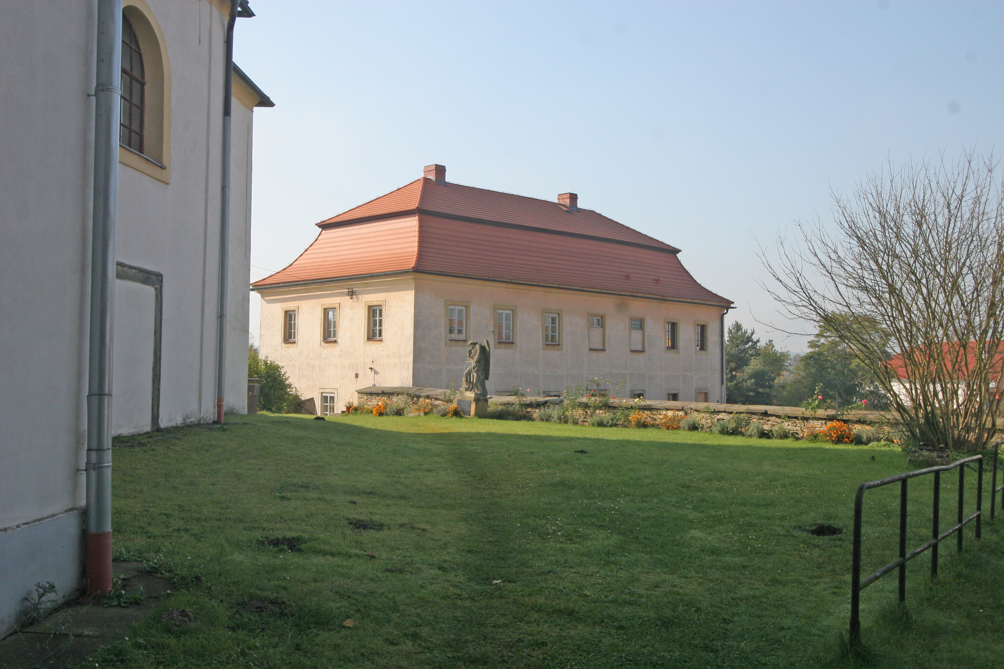 Fara (Týniště nad Orlicí), Mírové nám. 1, Týniště nad Orlicí